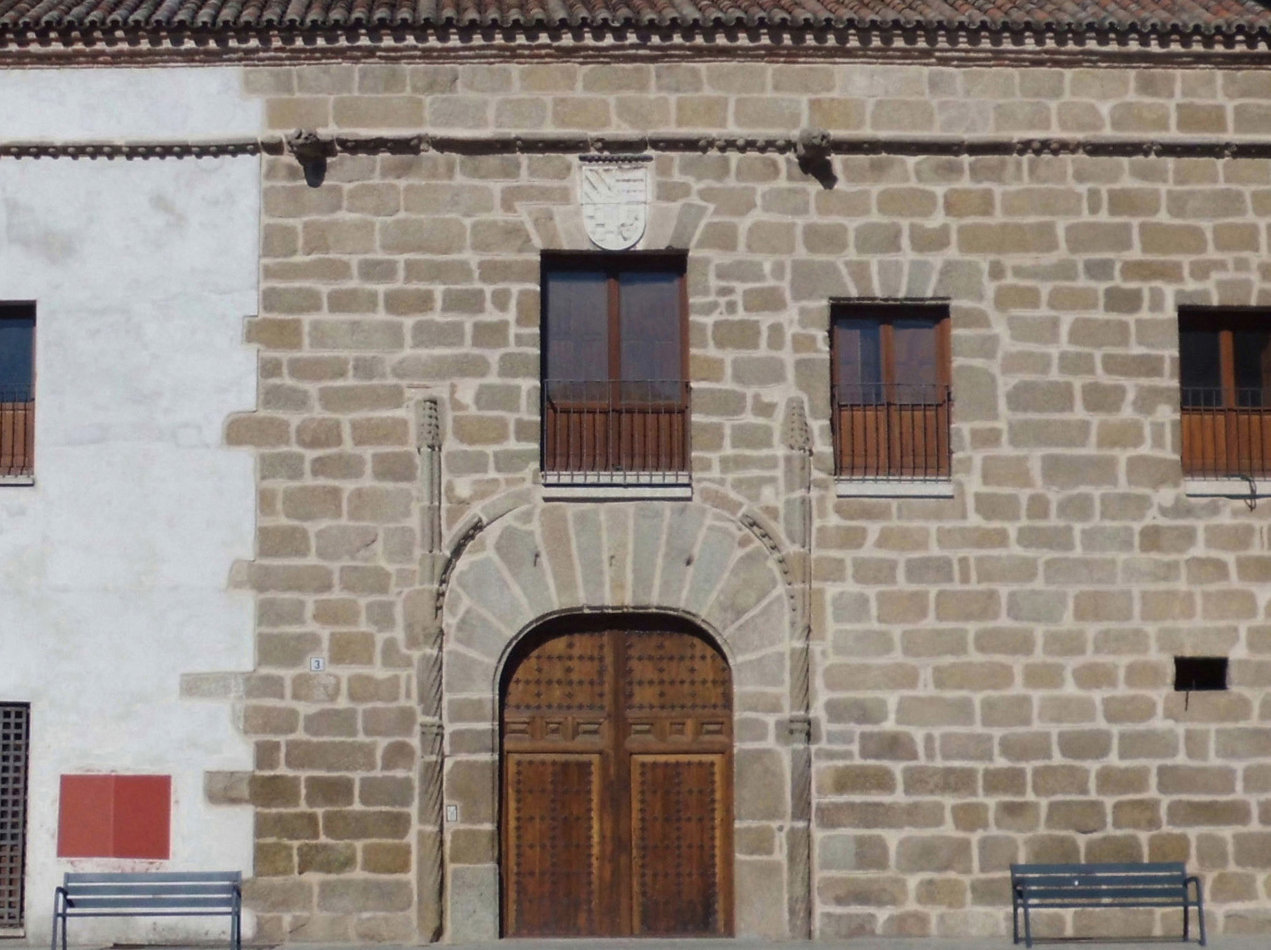 Palacio de Villlatoya en Talavera de la Reina.